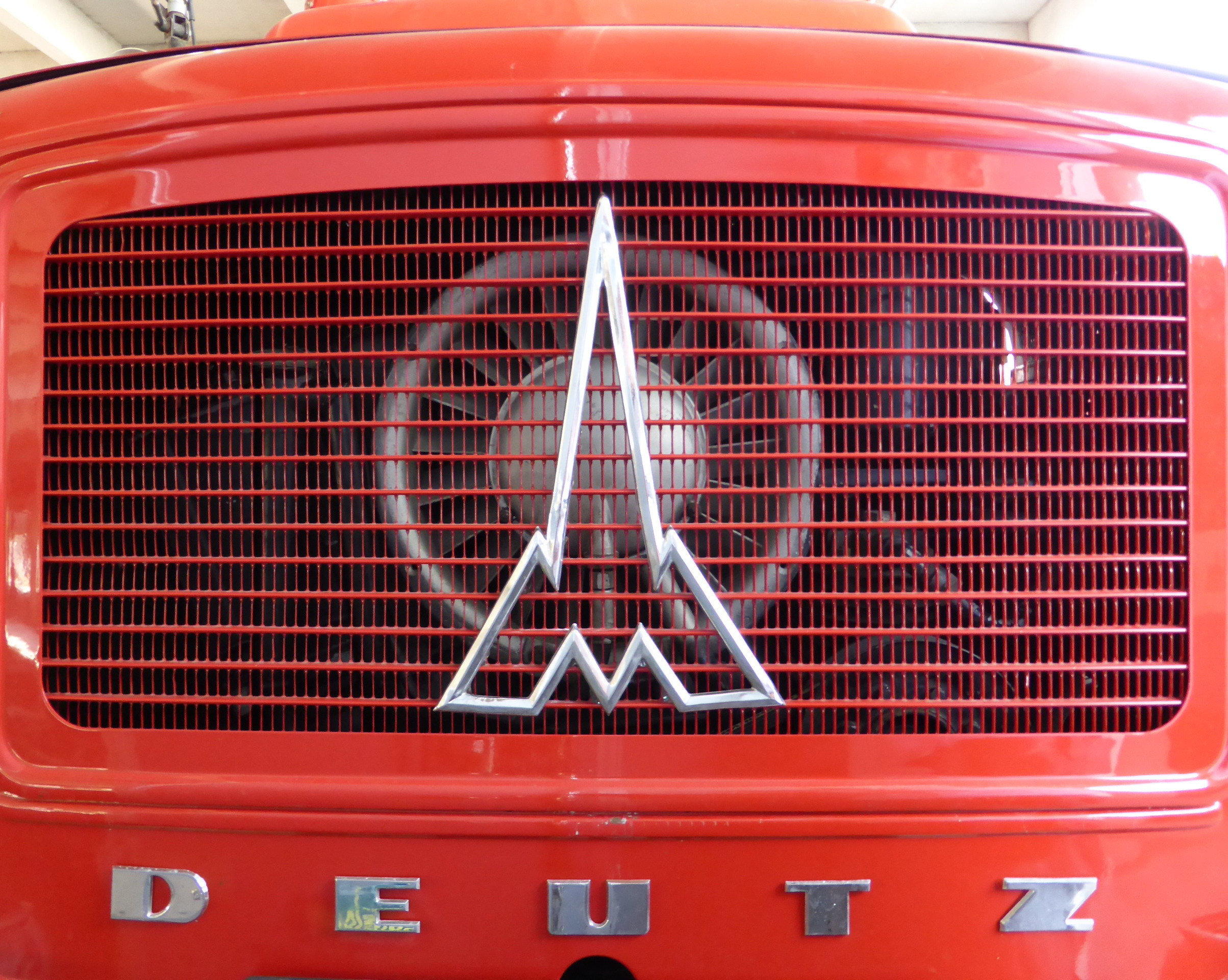 Kühlergitter eines Magirus-Deutz-Feuerwehrfahrzeugs.